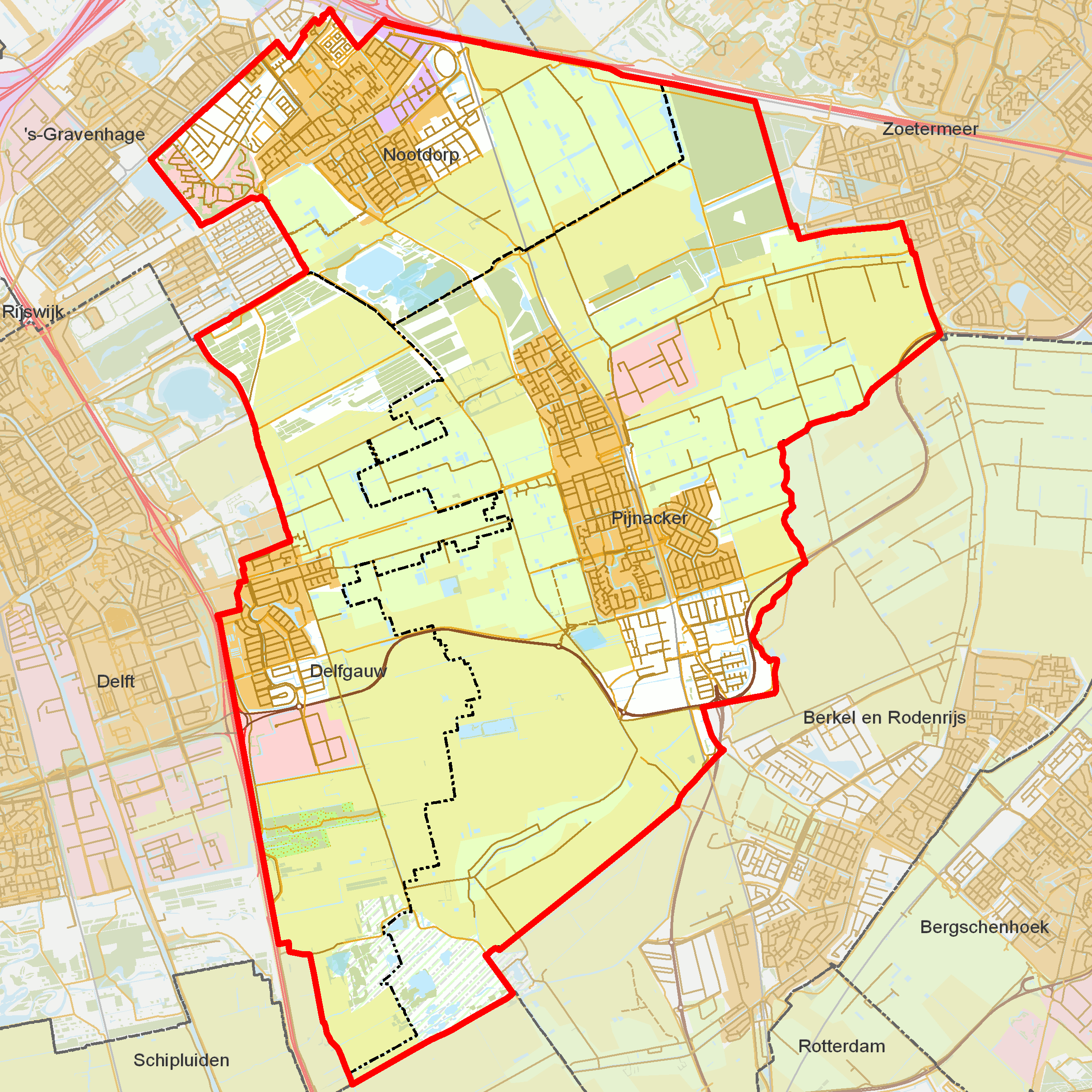 BAG woonplaatsen - Gemeente Pijnacker-Nootdorp.png